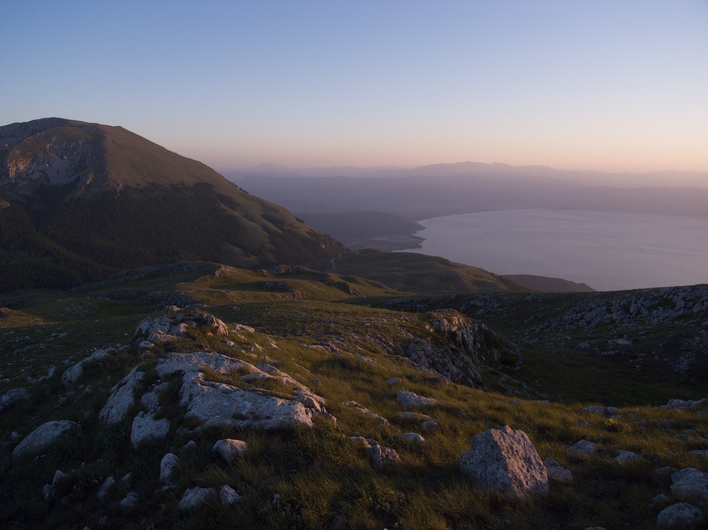 Ohrid Lake from Galičica